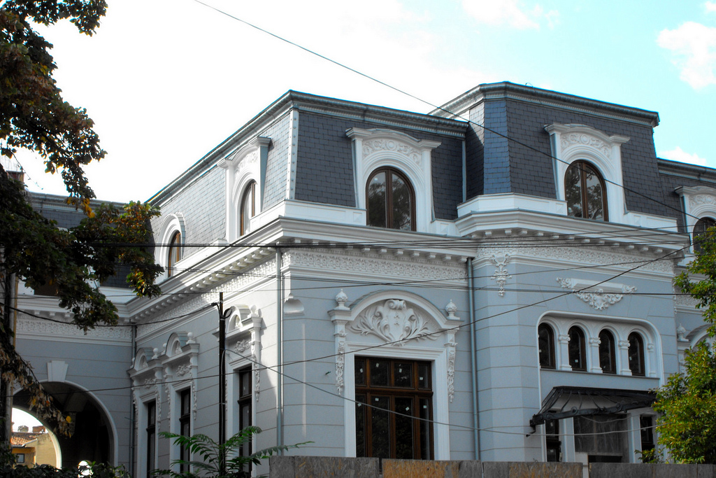 Polona 9